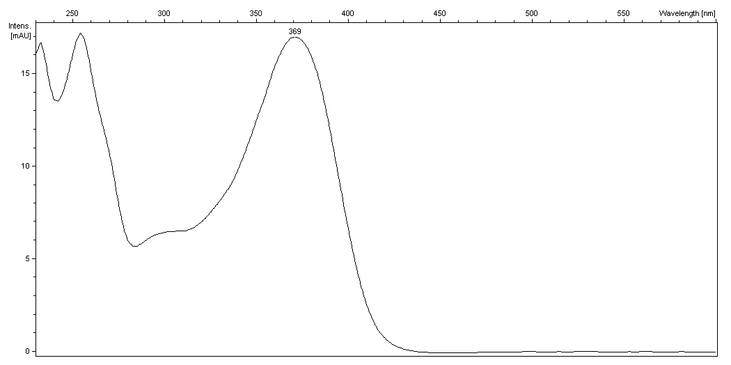 UV/VIS- Spektrum von Quercetin